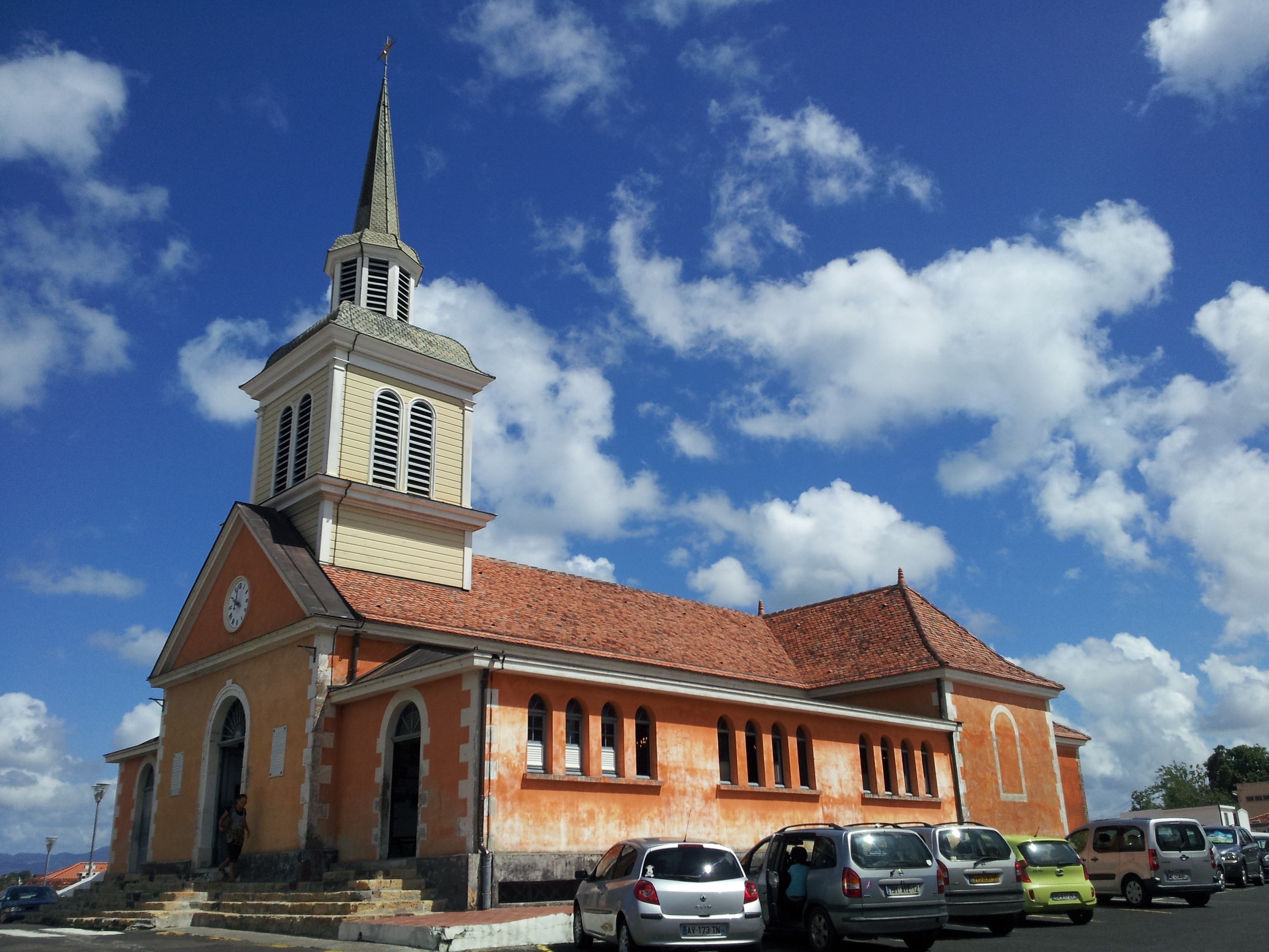 Église Notre-Dame de la Bonne-Délivrance des Trois-Îlets